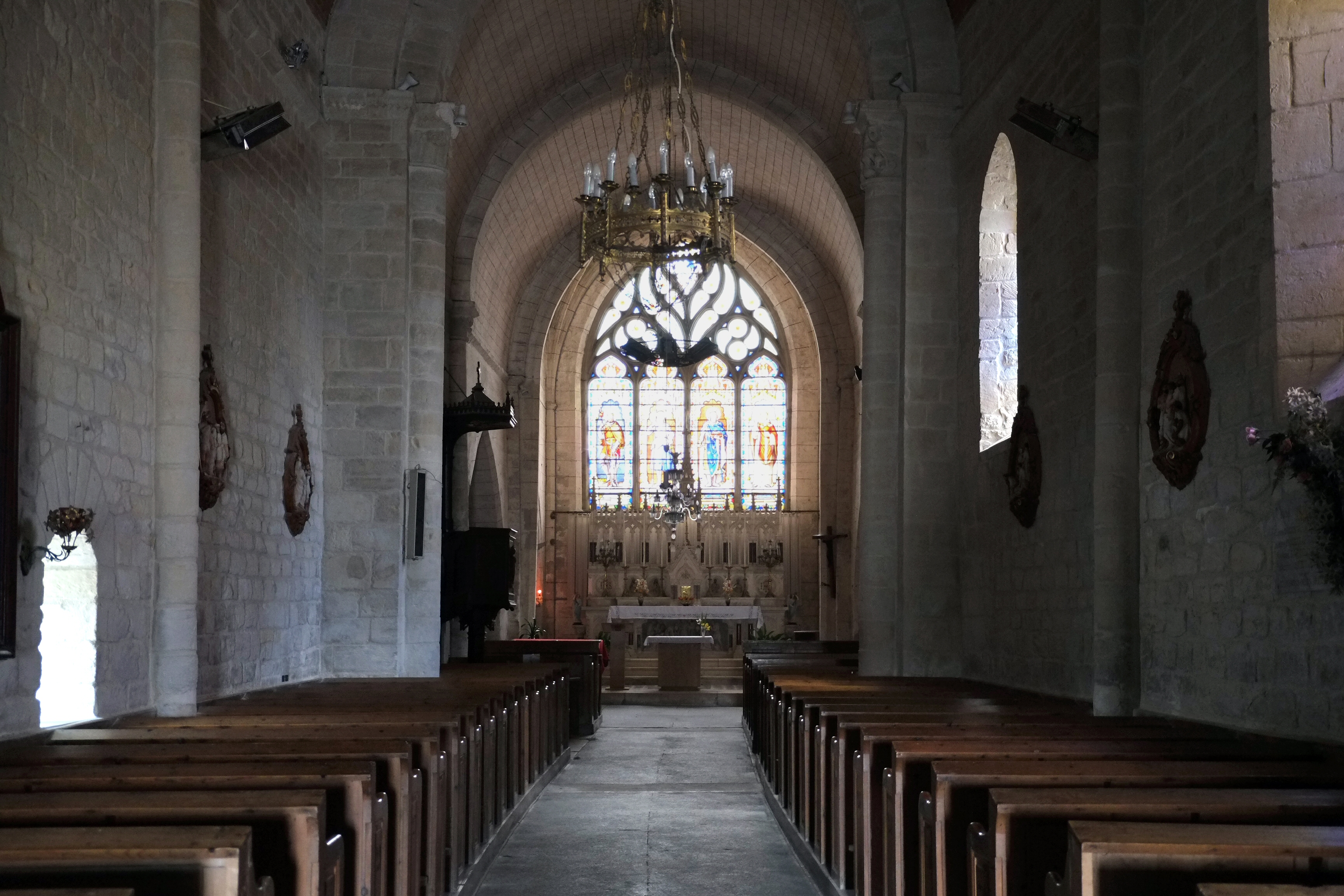 Nef de l'église Notre-Dame Courçon Charente-Maritime France